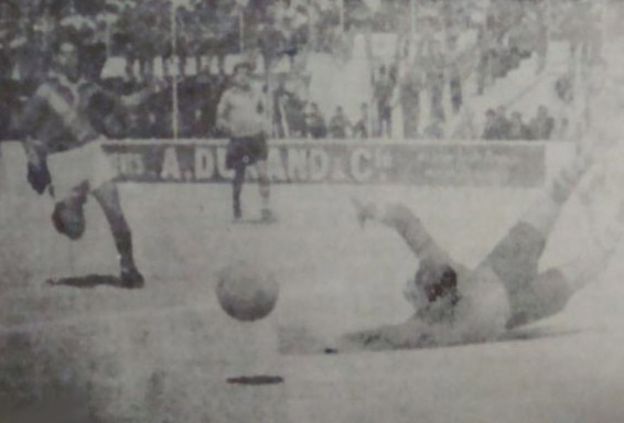 Match du 11/03/1954; dernier match de la période coloniale de la JS Kabylie face à l'OM Saint Eugène, match comptant pour les barrages de promotion vers la 1ere division. Image tirée du journal disparu "Champion"